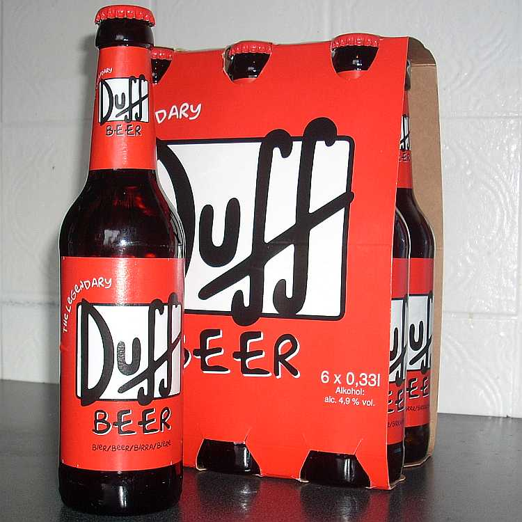 6er-Pack Duff-Bier in Deutschland